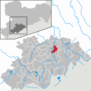 Großolbersdorf im Erzgebirgskreis, Sachsen